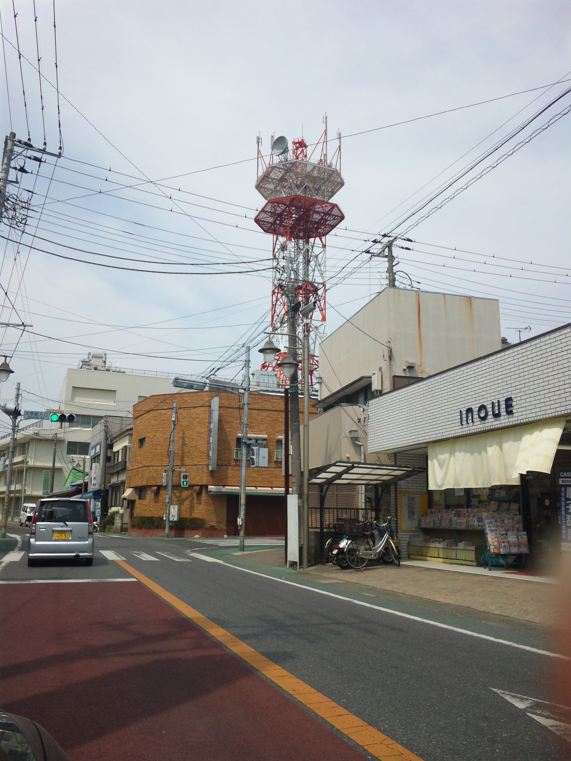 NTT東日本大原ビル